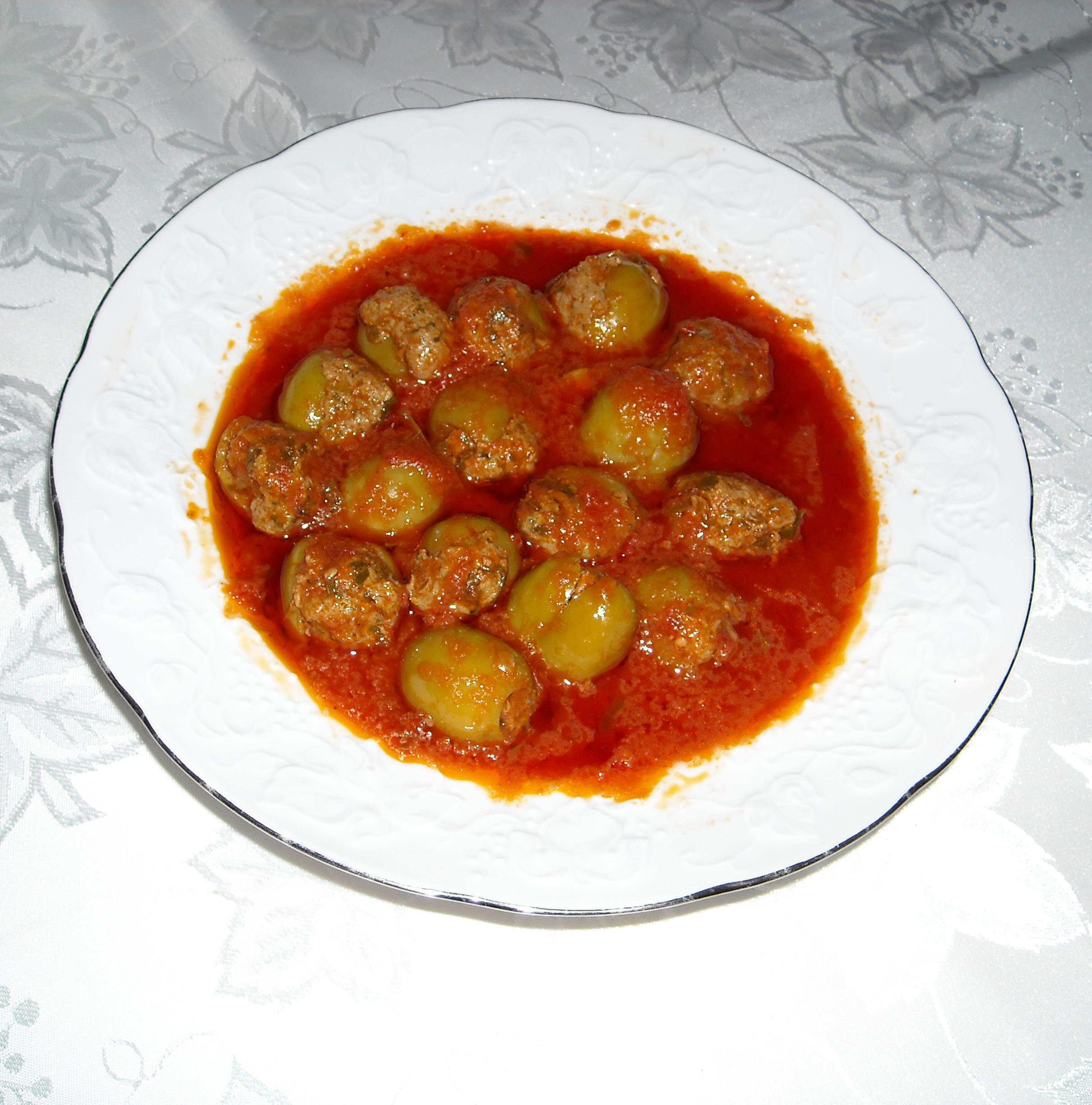 Ragoût d'olives farcies à la tunisienne